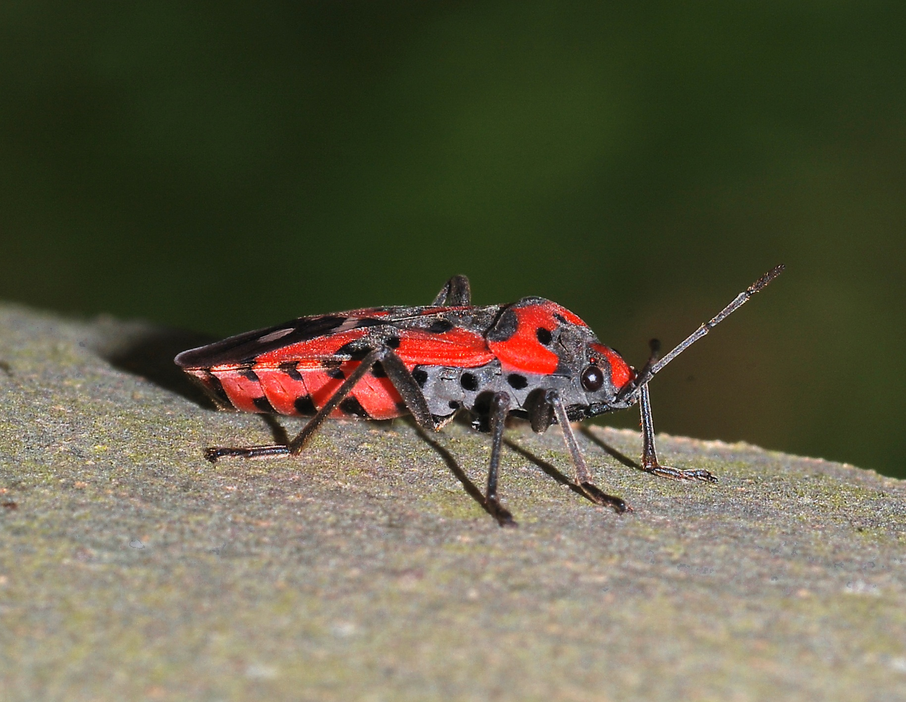 Ground bug (Lygaeus equestris or L. simulans)